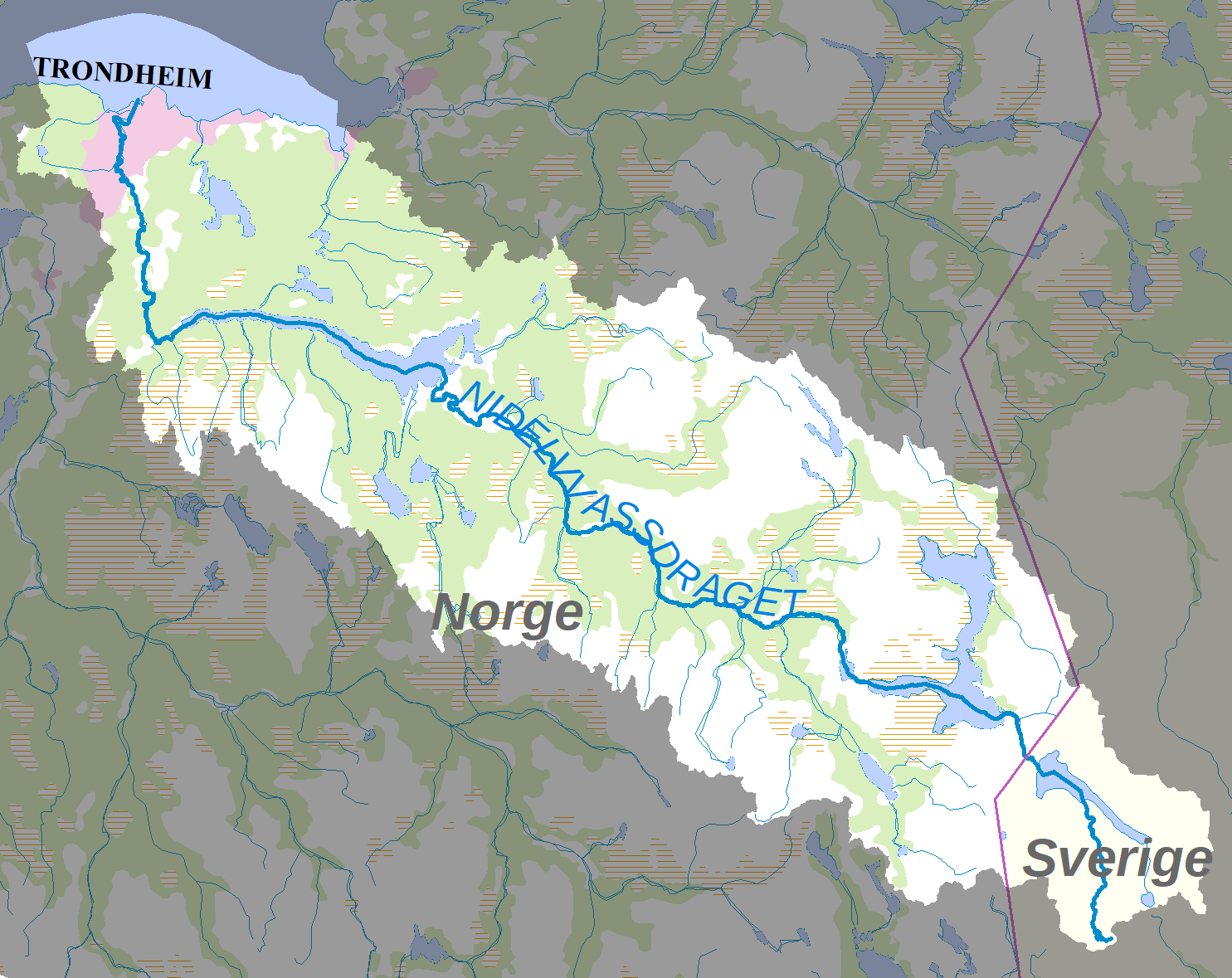 Karta över Nidelvassdraget (Nean). Det markerade området är älevns avrinningsområde.